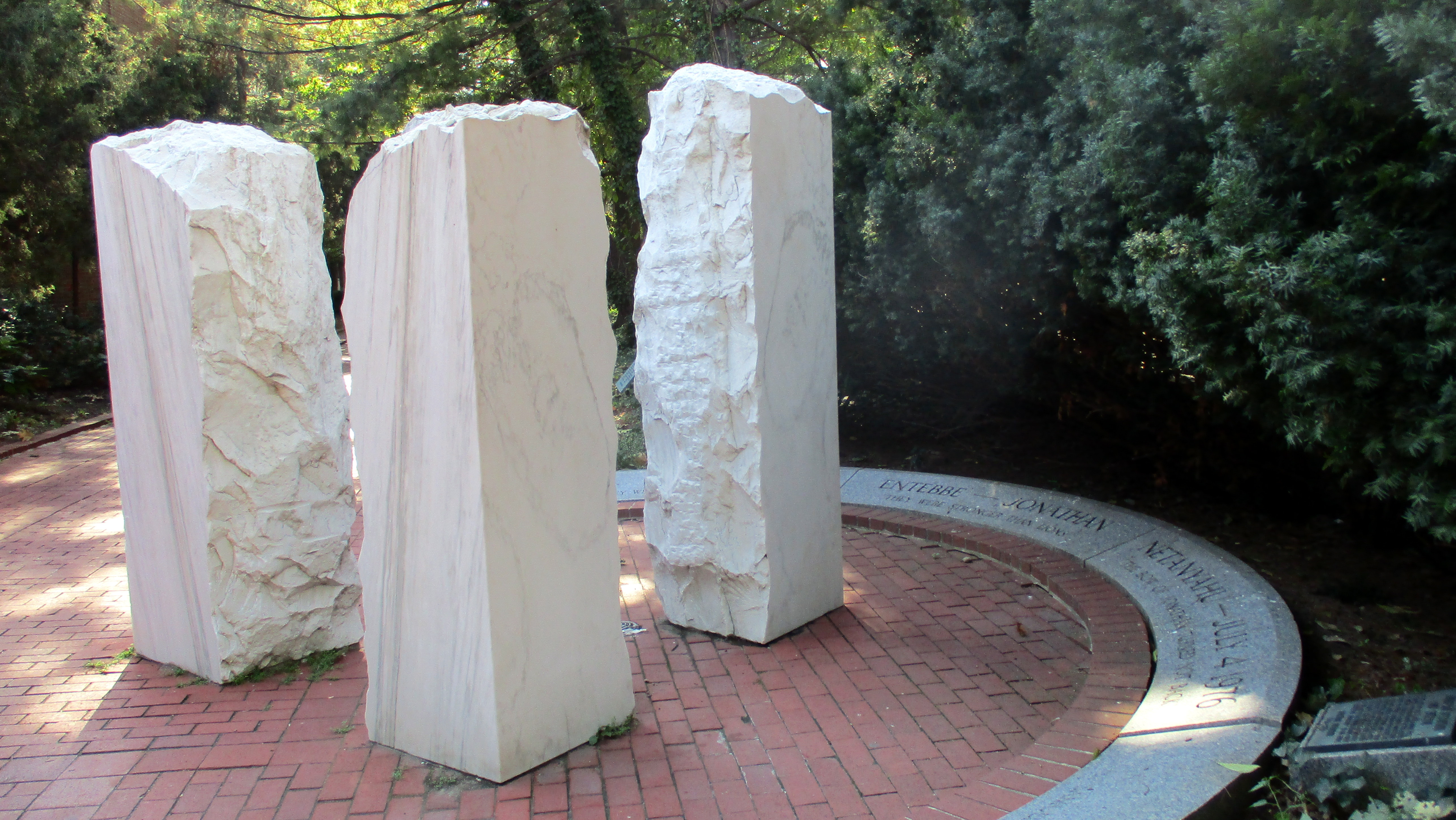 אנדרטת יוני נתניה בחזית בית הכנסת קהל קודש במרכז פילדלפיה (מול מרכז המבקרים).